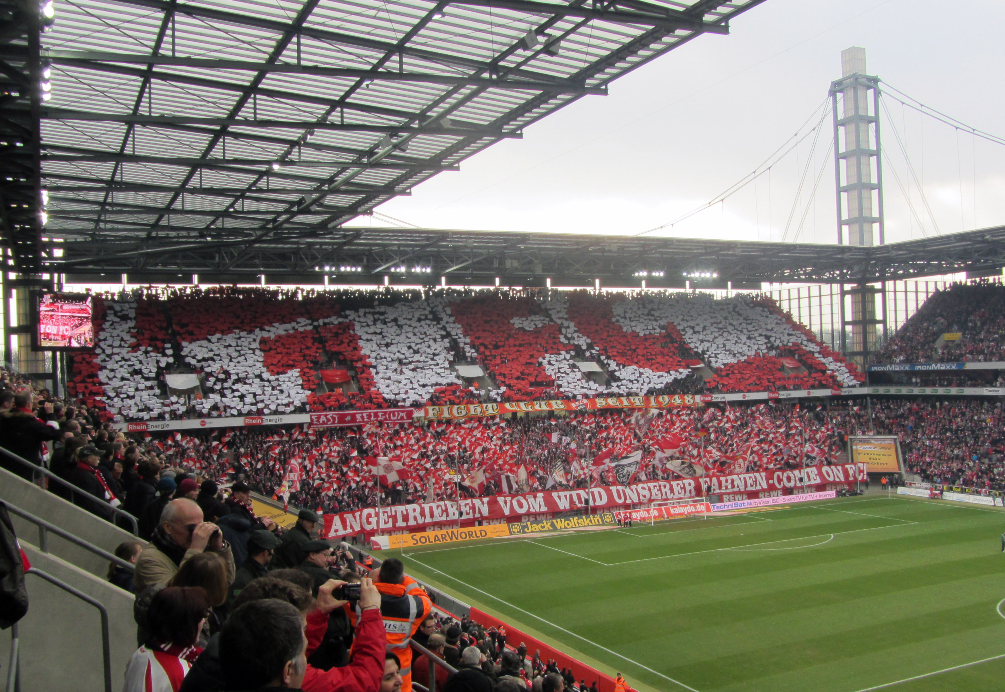 Rhein-Energie-Stadion 1. FC Köln - Bayer Leverkusen 0:2 25-Feb-2012 Fan-Choreografie